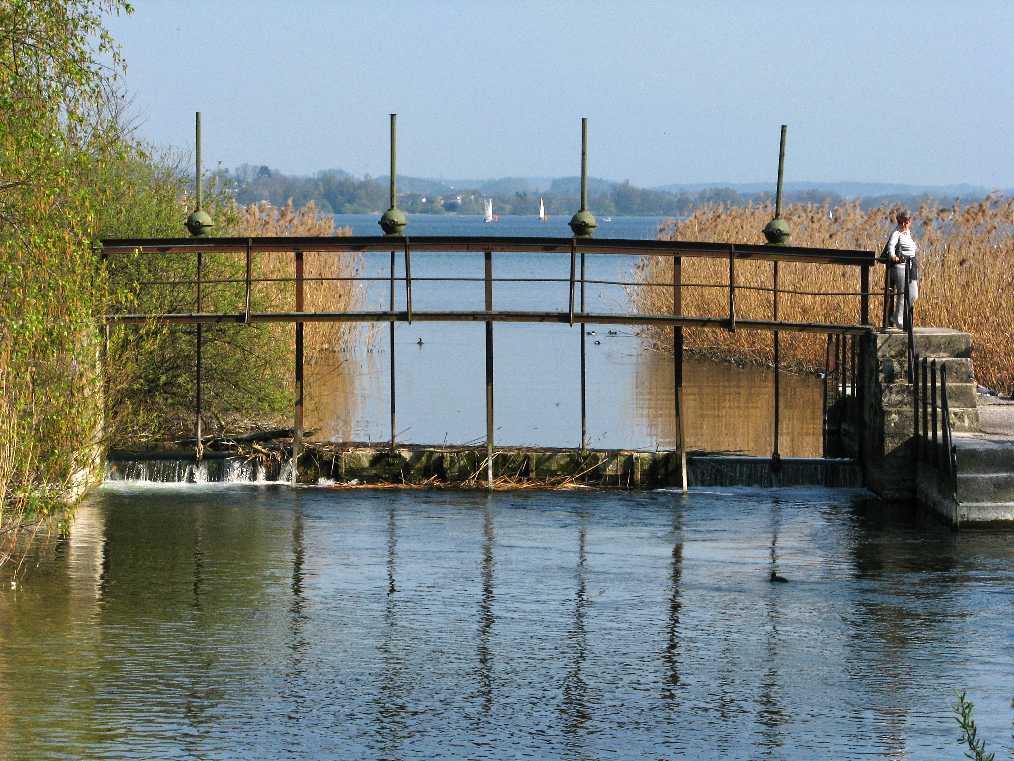 Greifensee (Lake Greifen) as seen from Glatt effluence in Schwerzenbach